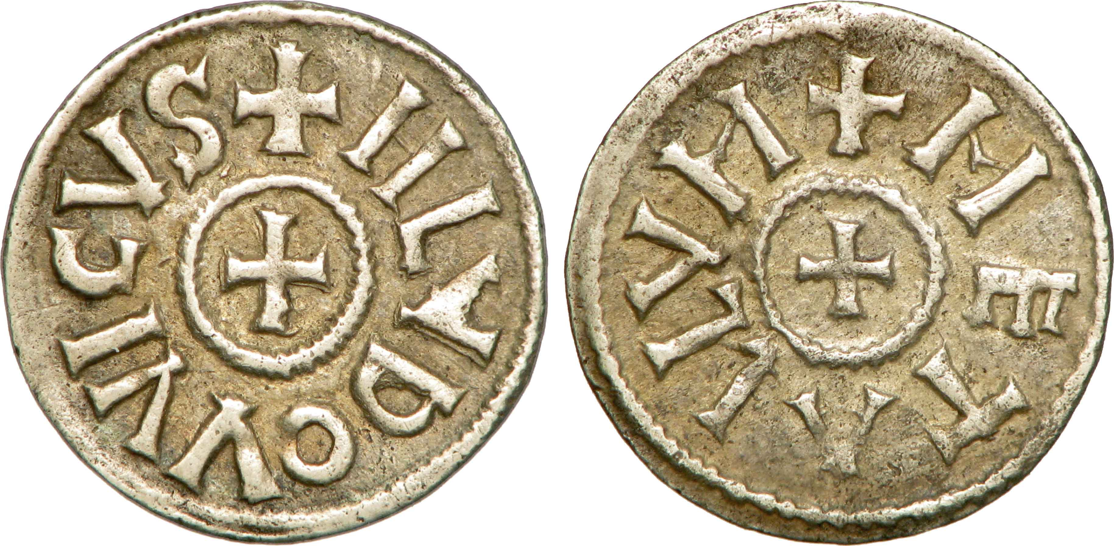 Nom de l'atelier/ville : Melle Métal : argent Diamètre : 15,5mm Axe des coins : 6h. Poids : 0,82g. Degré de rareté : R2 Titulature avers : + HLVDOVVICVS. Description avers : Croix. Traduction avers : (Louis). Titulature revers : + METALLVM. Description revers : Croix. Traduction revers : (Melle).